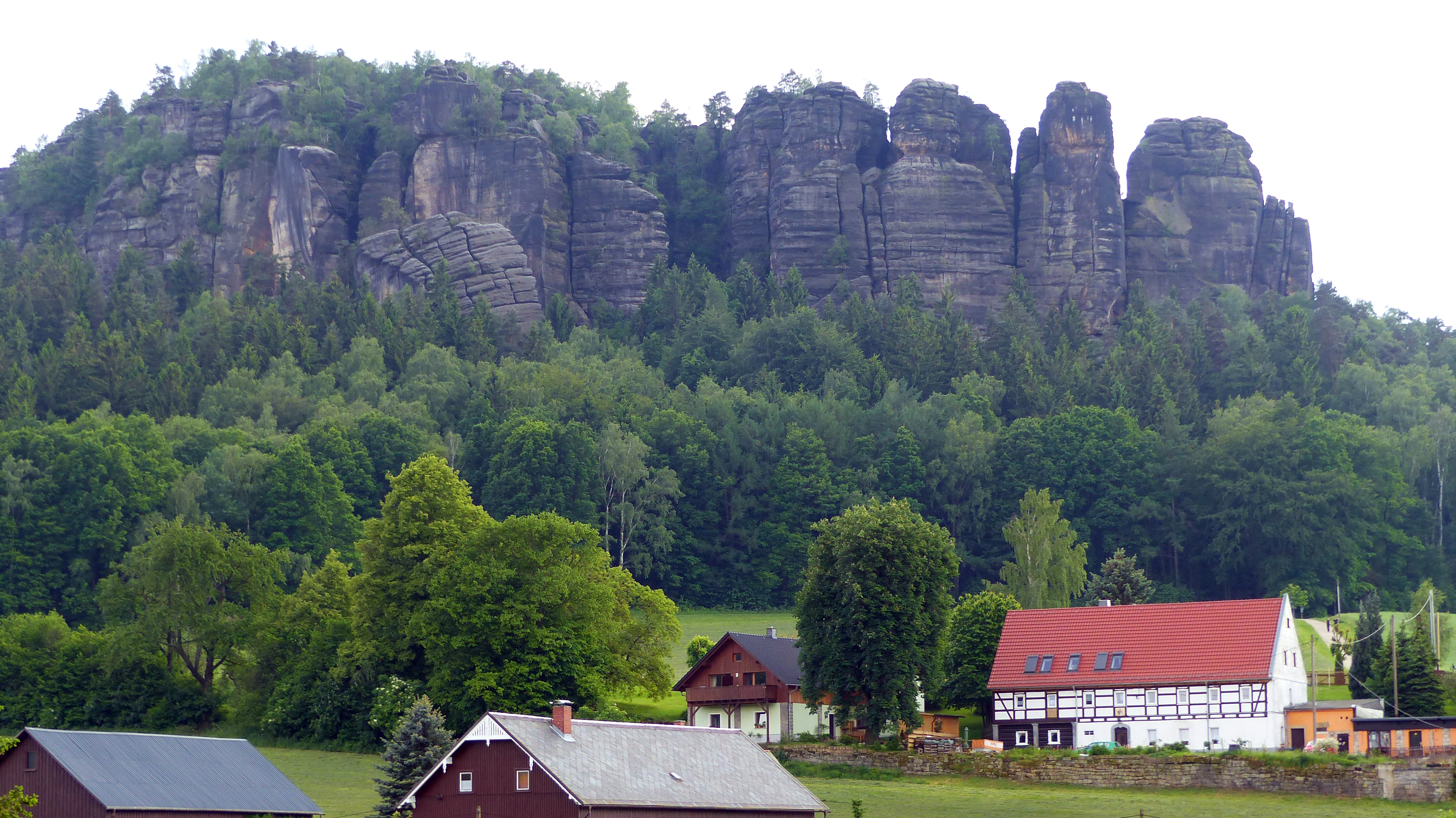 Pfaffenstein in der Sächsischen Schweiz, Königstein